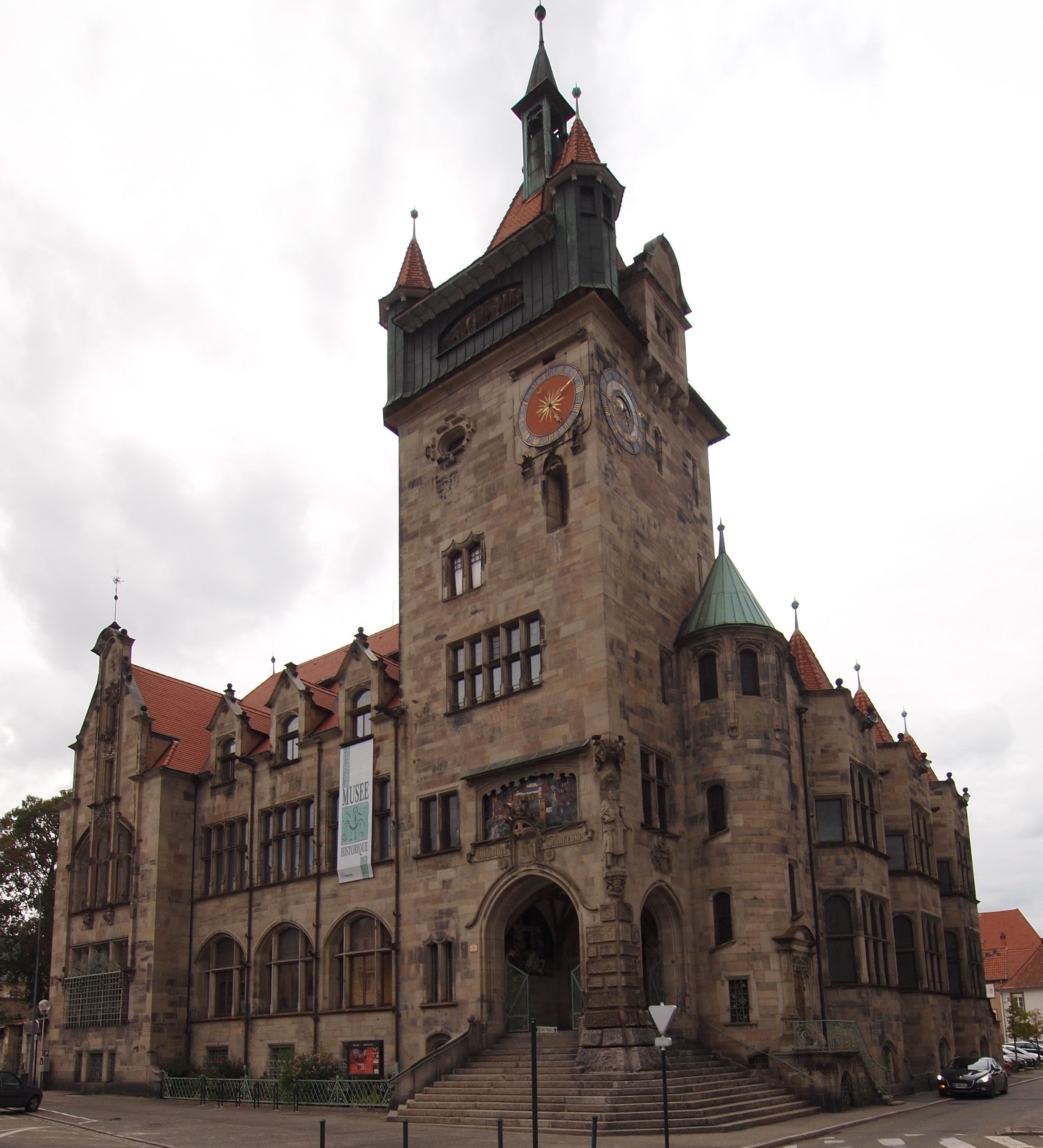 Haguenau, musée historique